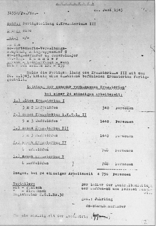 Записка посланная генералу Каммлеру, в которой указано сколько тел может быть сожжено в Освенциме за один день - 4756